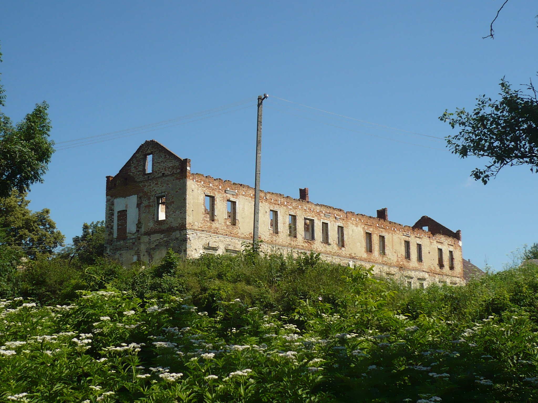 Ruins of palace of Zolotyi Potik castle (pol. Potok Złoty. Zamek)